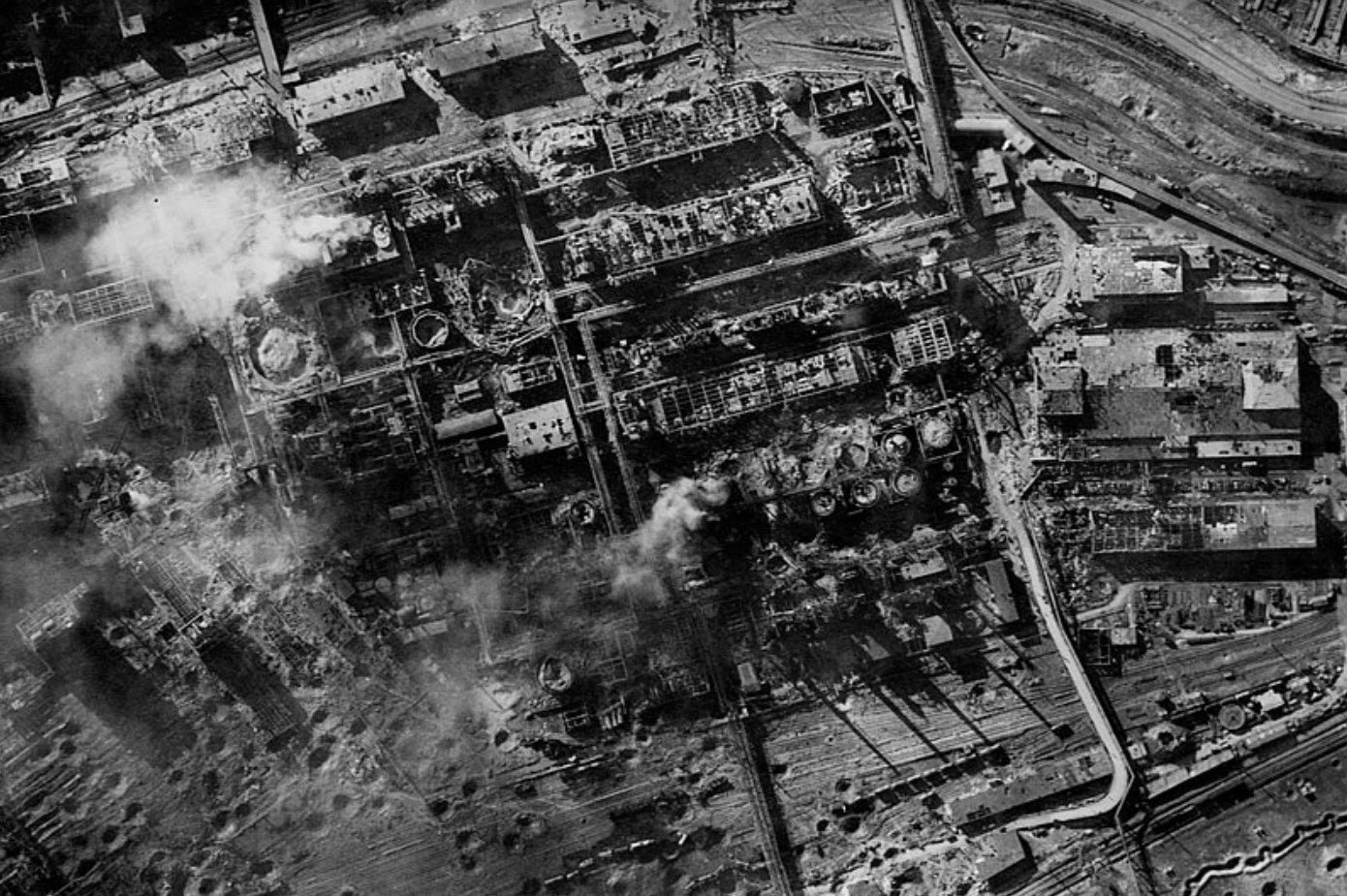 BRABAG Böhlen nach Luftangriff im Mai 1944 Fotografiert im Deutschen Chemie-Museum Merseburg